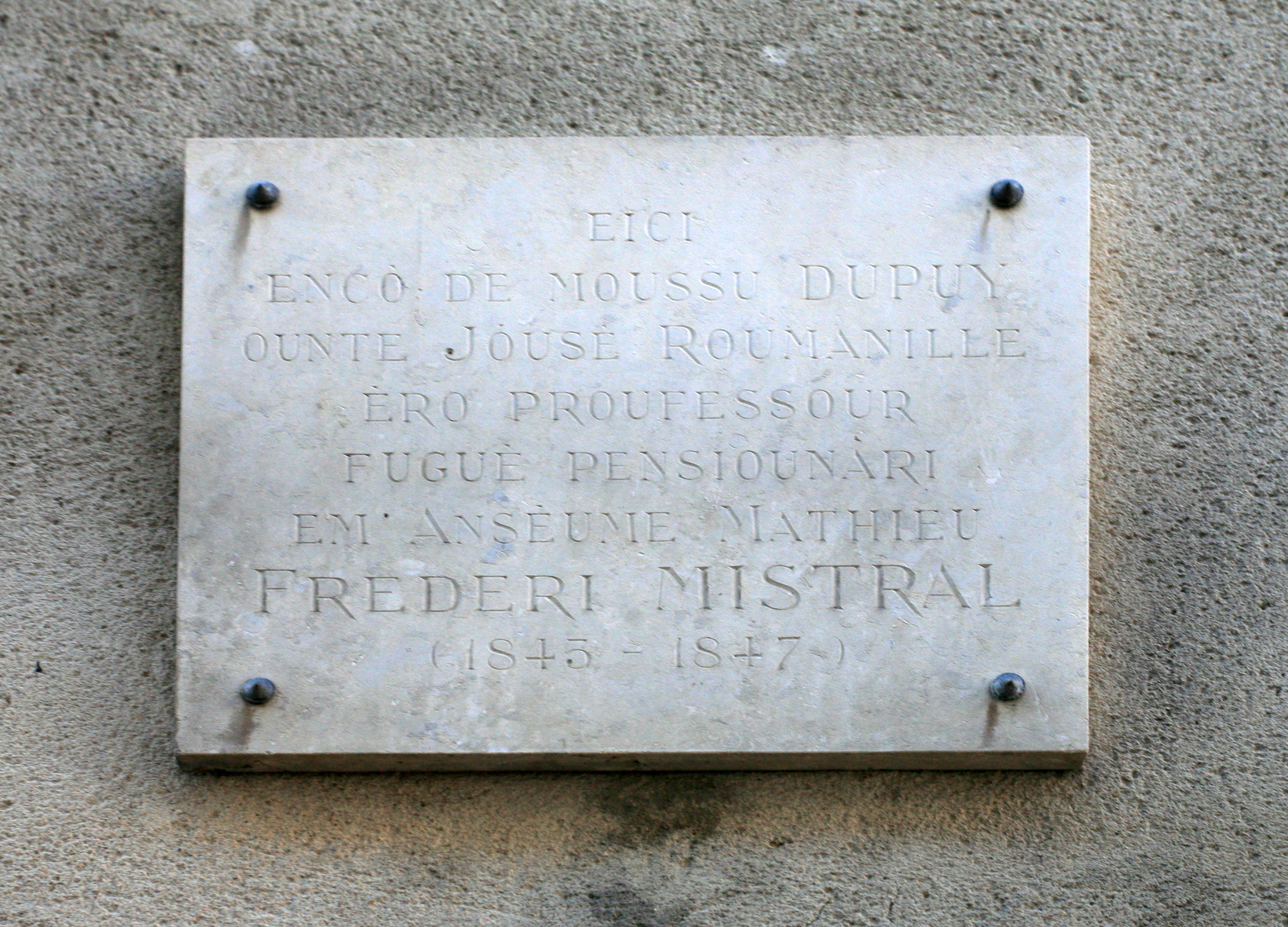 École de la rue Louis Pasteur Avignon, Vaucluse, France - plaque